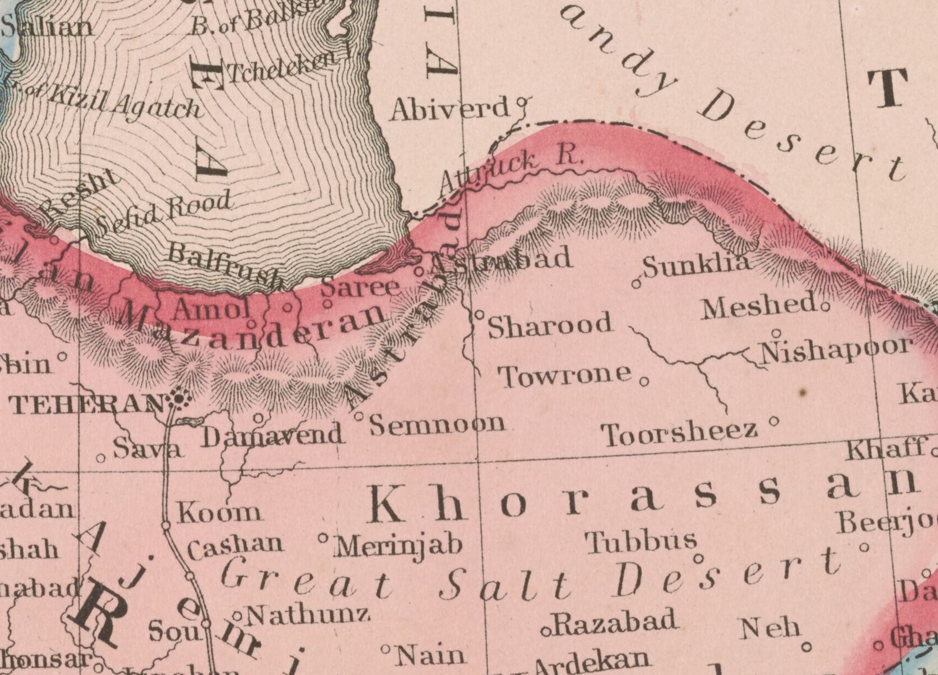 1860 Map of Persia